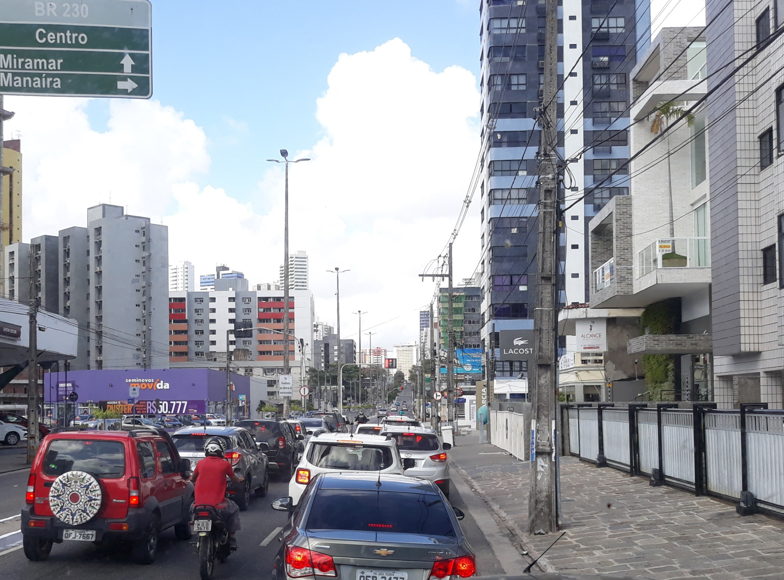 Trânsito na Avenida Senador Ruy Carneiro, entre os bairros de Tambaú (esquerda) e Manaíra (direita), na cidade de João Pessoa, capital da Paraíba, Brasil